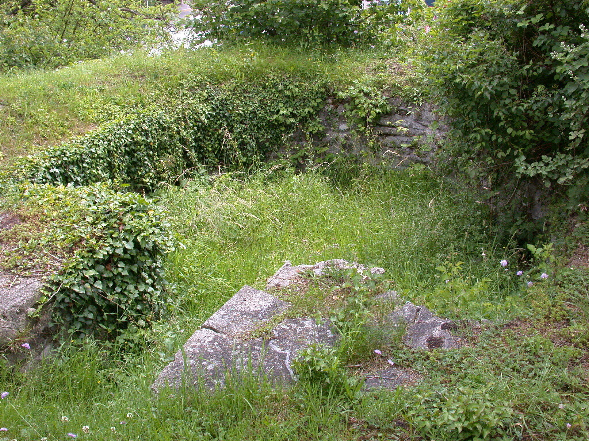 Porta principalis sinistra (Seitentor links) des spätrömischen Kastells Tasgetium, spätantiker Donau-Iller-Rhein-Limes, Stein am Rhein, Schweiz.